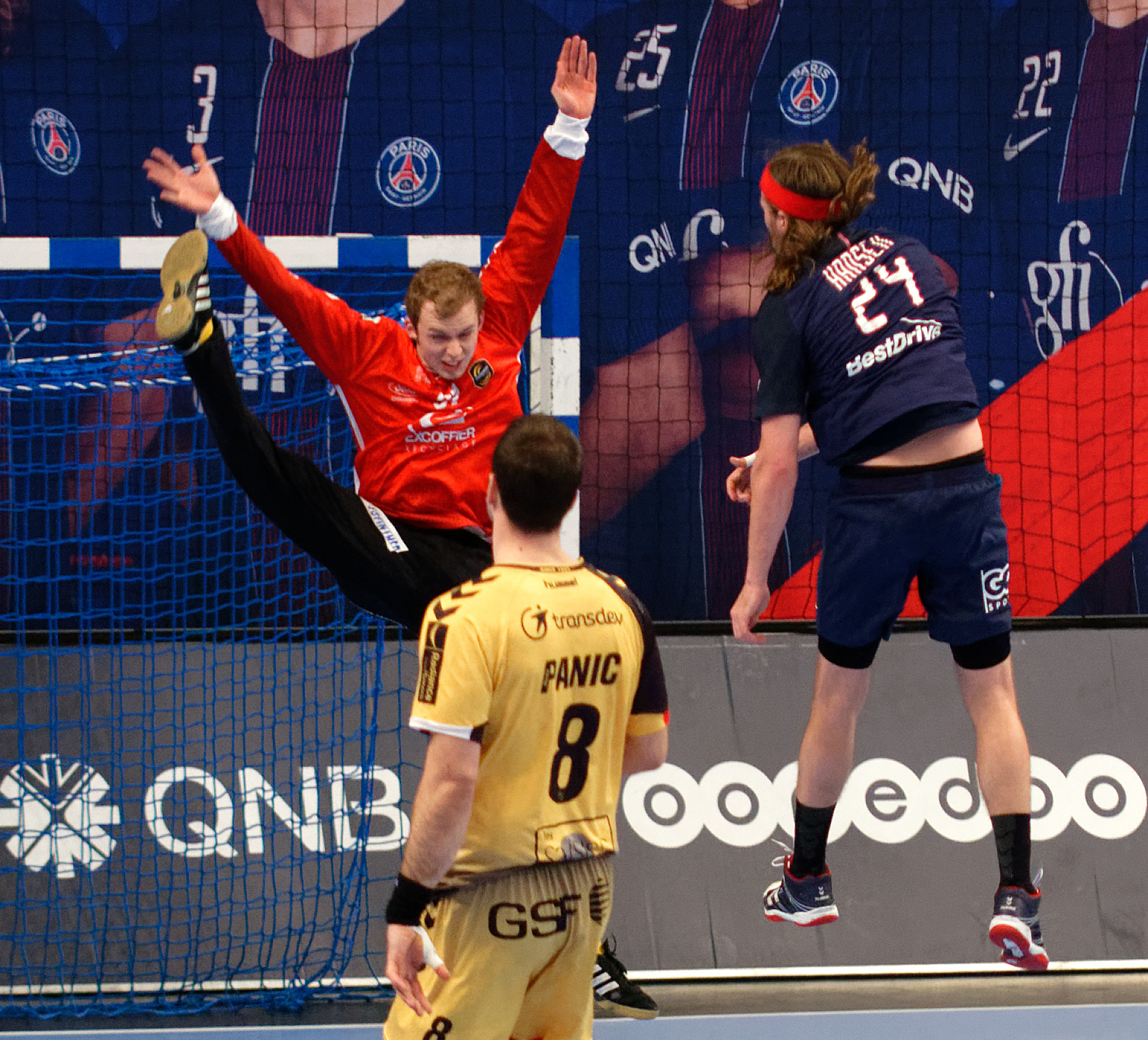 Rencontre de championnat de LidlStarLigue entre le PSG et chambéry. A coubertin, le 15 mars 2017.